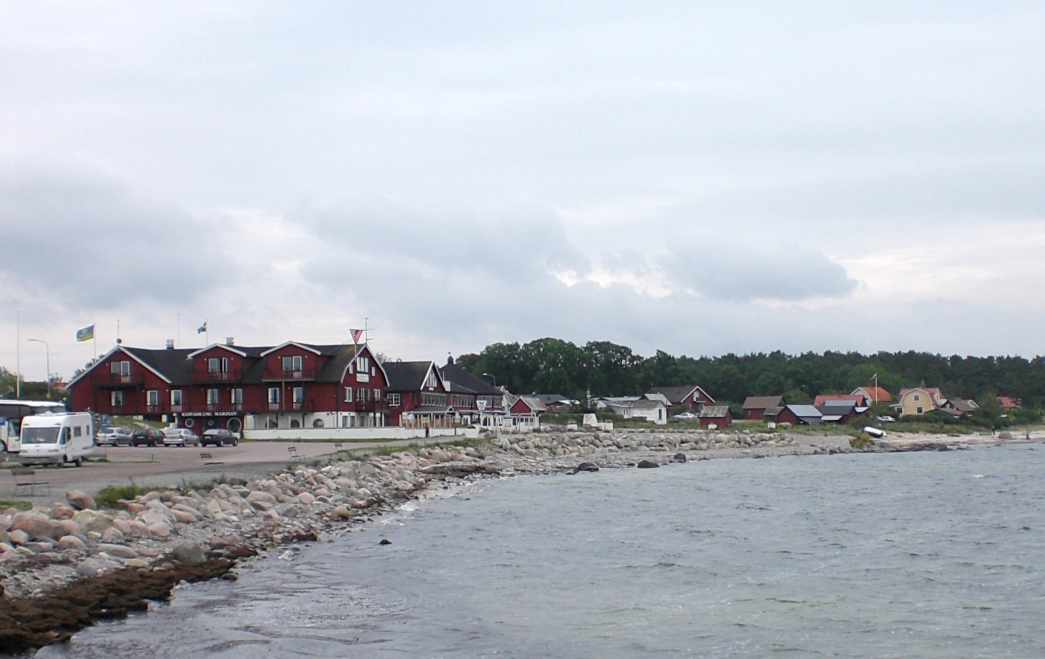 Blick vom Byxelkroker Hafen nach Süden auf Byxelkrok, Öland